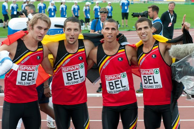 Europees Kampioenschap 2012 in Helsinki: van links naar rechts: Jente Bouckaert, Antoine Gillet, Kevin en Jonathan Borlée